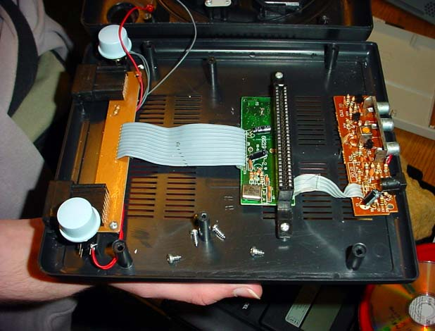 Innanmätet i en Nintendo-kopia